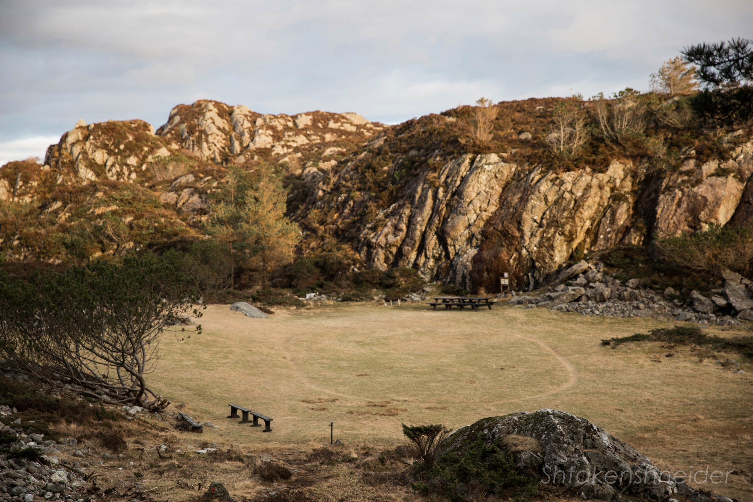 Круг на острове Эспевэр, происхождение которого до конца не известно.